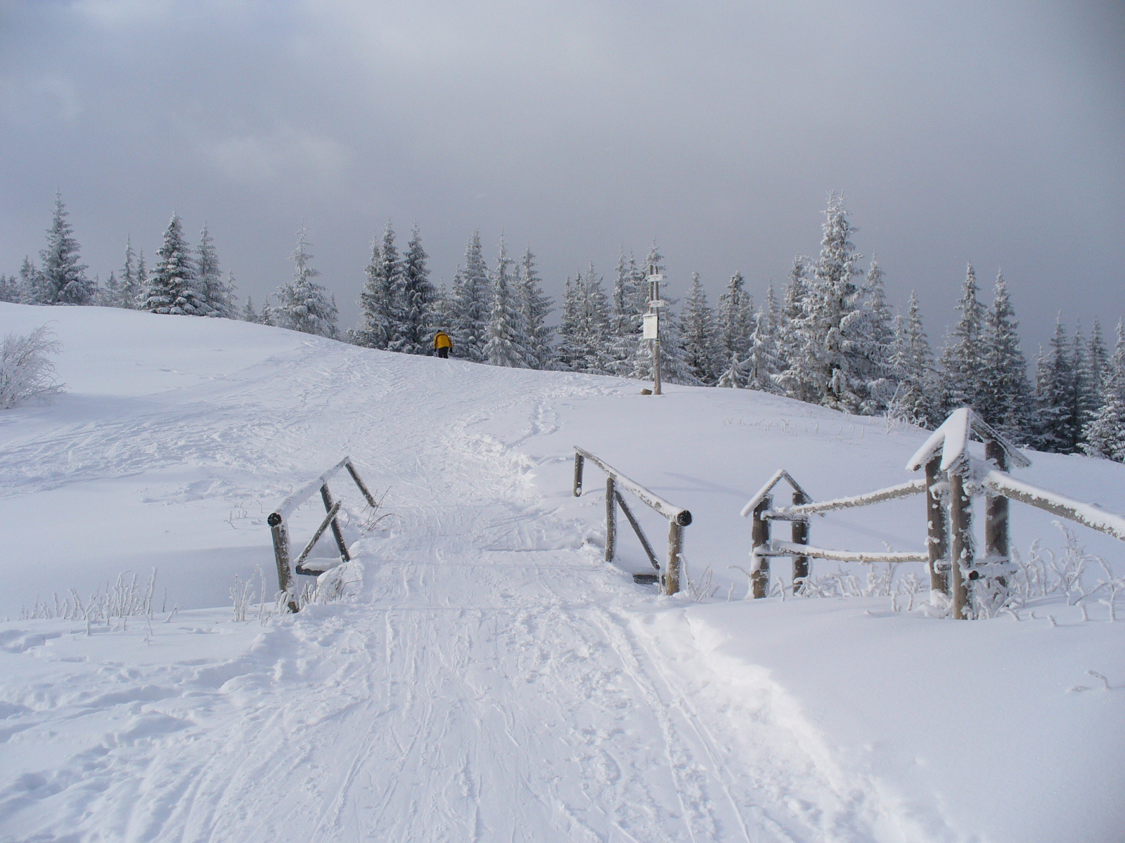 Winter in Żywiec Beskids, Poland.